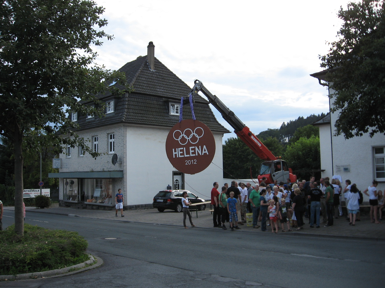 In Oeventrop warten Einwohner auf die Rückkehr von Helena Fromm von den Olympischen Spielen.